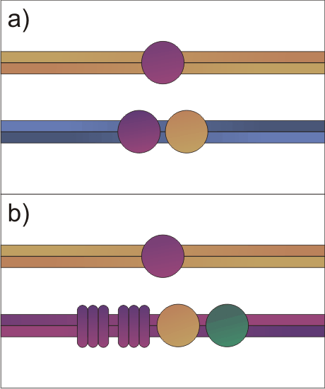 Dwie pary dopuszczalnych sznurów służbowych w ZHP dla tych samych duetów funkcji